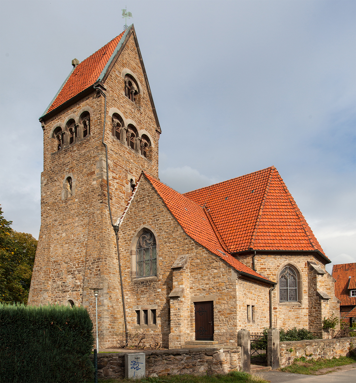 St.-Peter-und-Pauls-Kirche in Veltheim (Porta Westfalica) This is the photograph of an architectural monument. It is part of the list of cultural monuments of Porta Westfalica, no. 0164